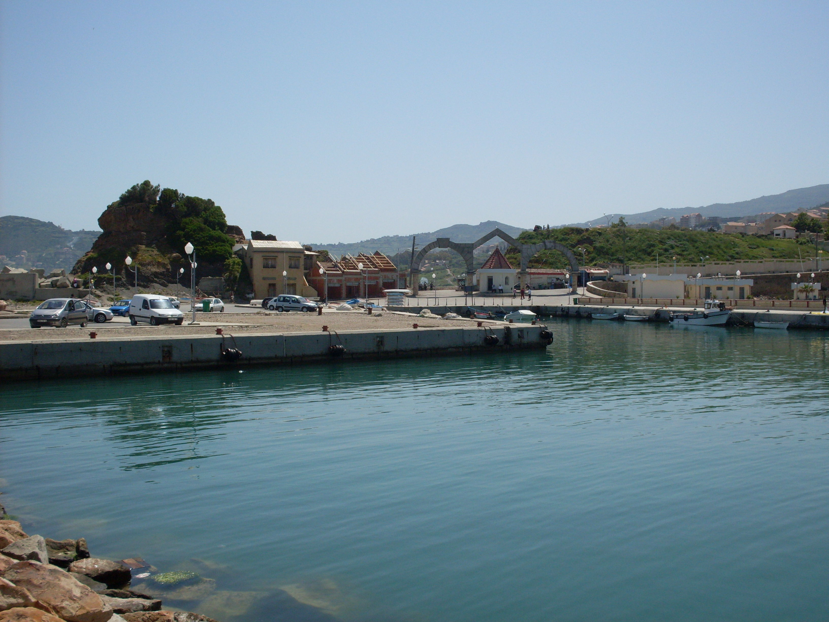 Vue partielle sur le port de Tigzirt en Kabylie (Tizi Ouzou, Algerie)